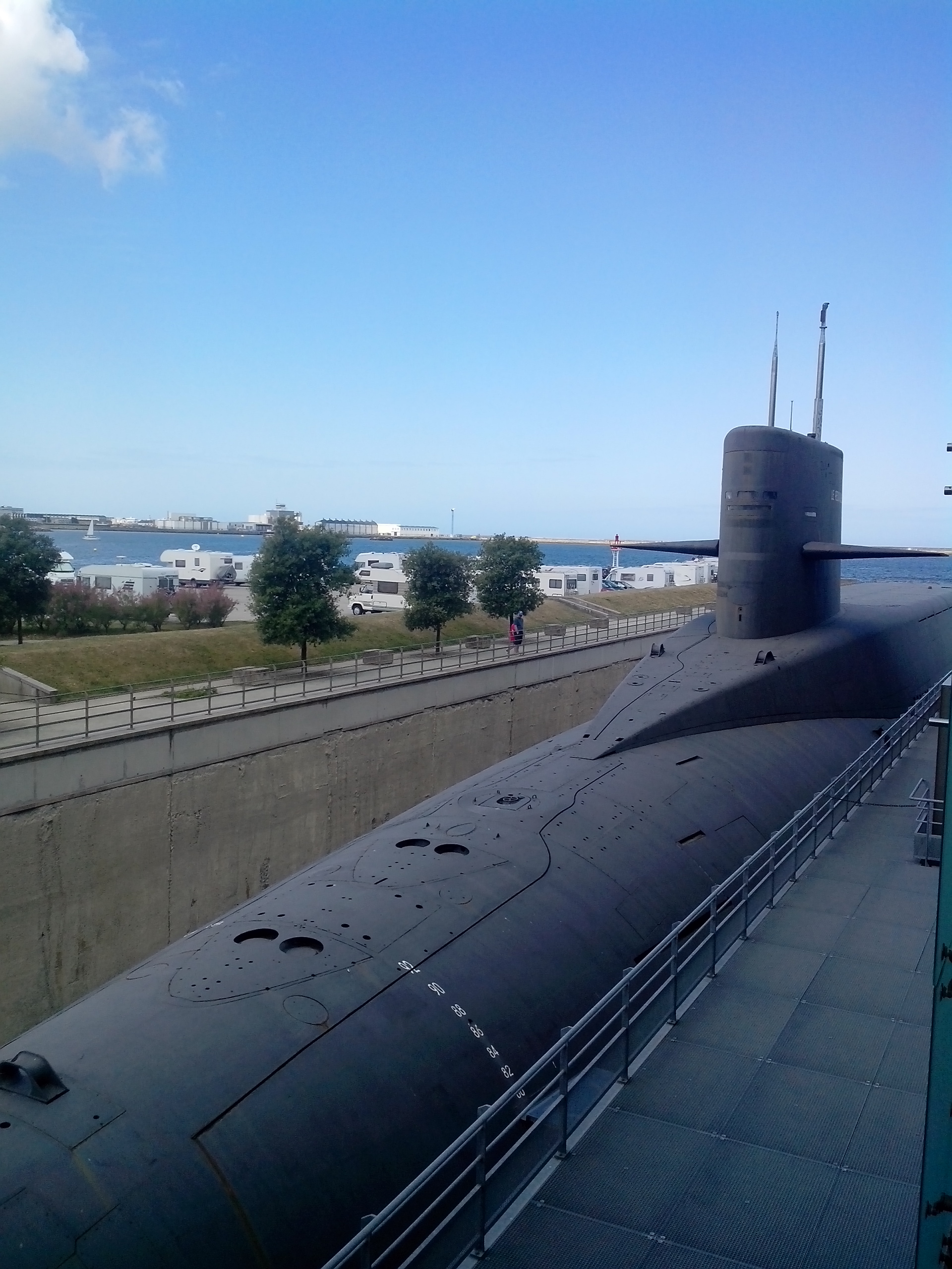 Vue globale du redoutable depuis les escaliers menant à l'aquarium de la Cité de la Mer.